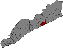 Localització de Sant Pol de Mar al Maresme